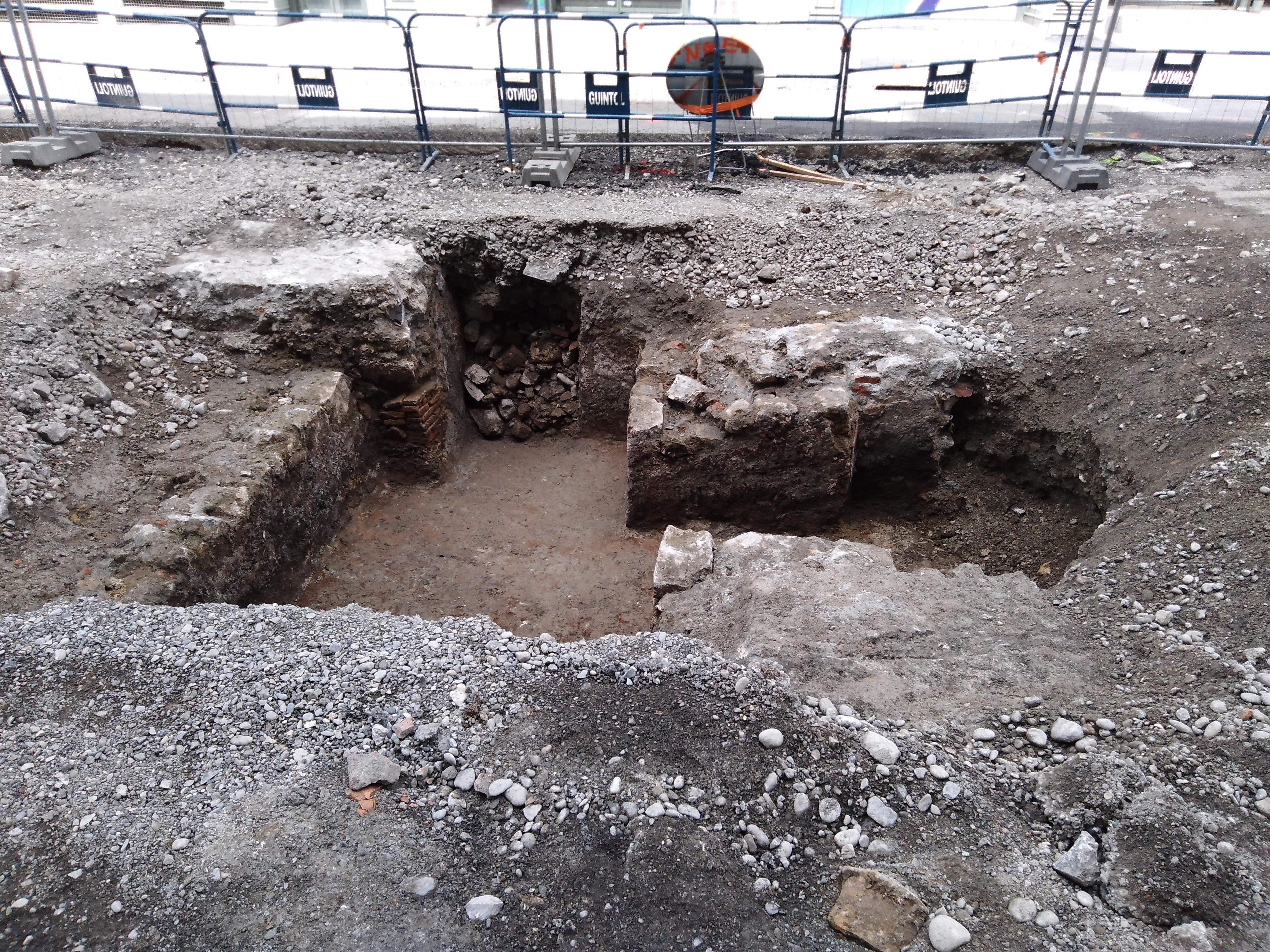 Fouilles de juin 2019 rue de la République (couvent des dominicains)